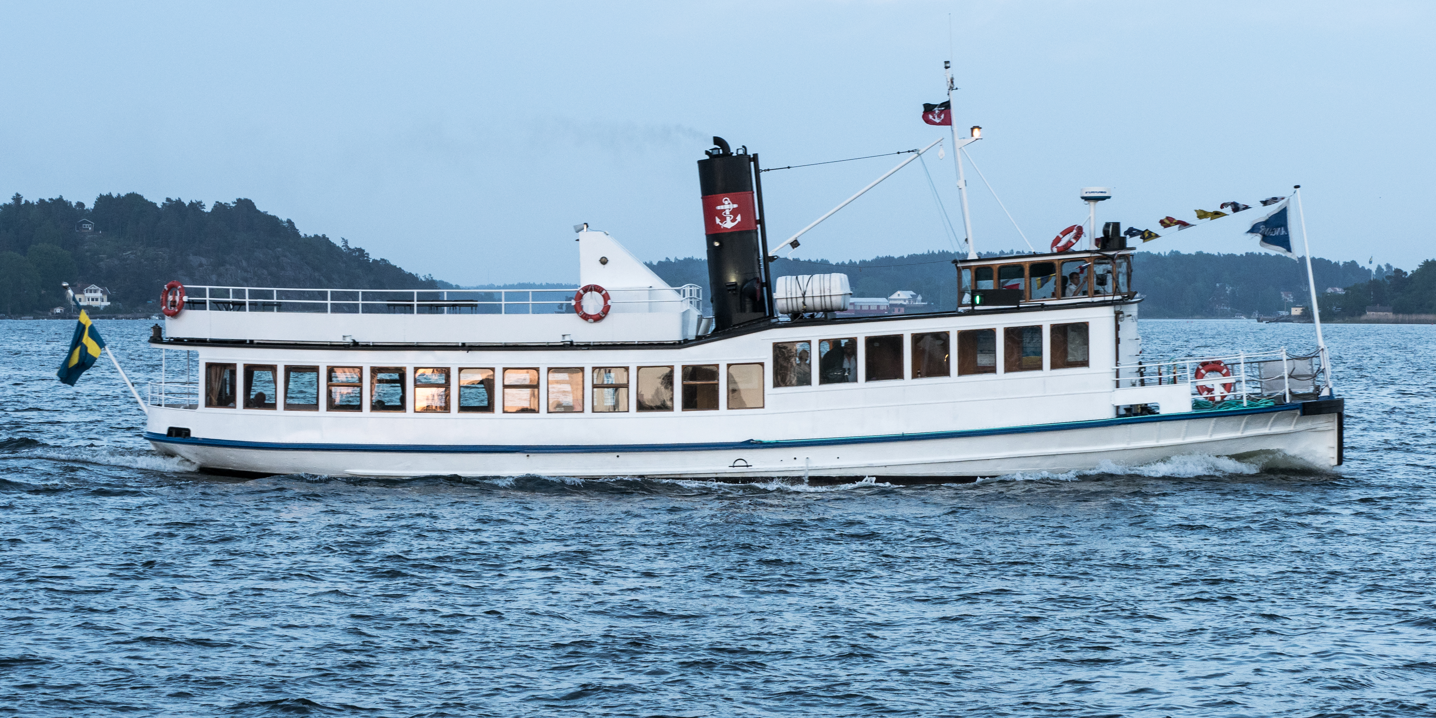 Angantyr